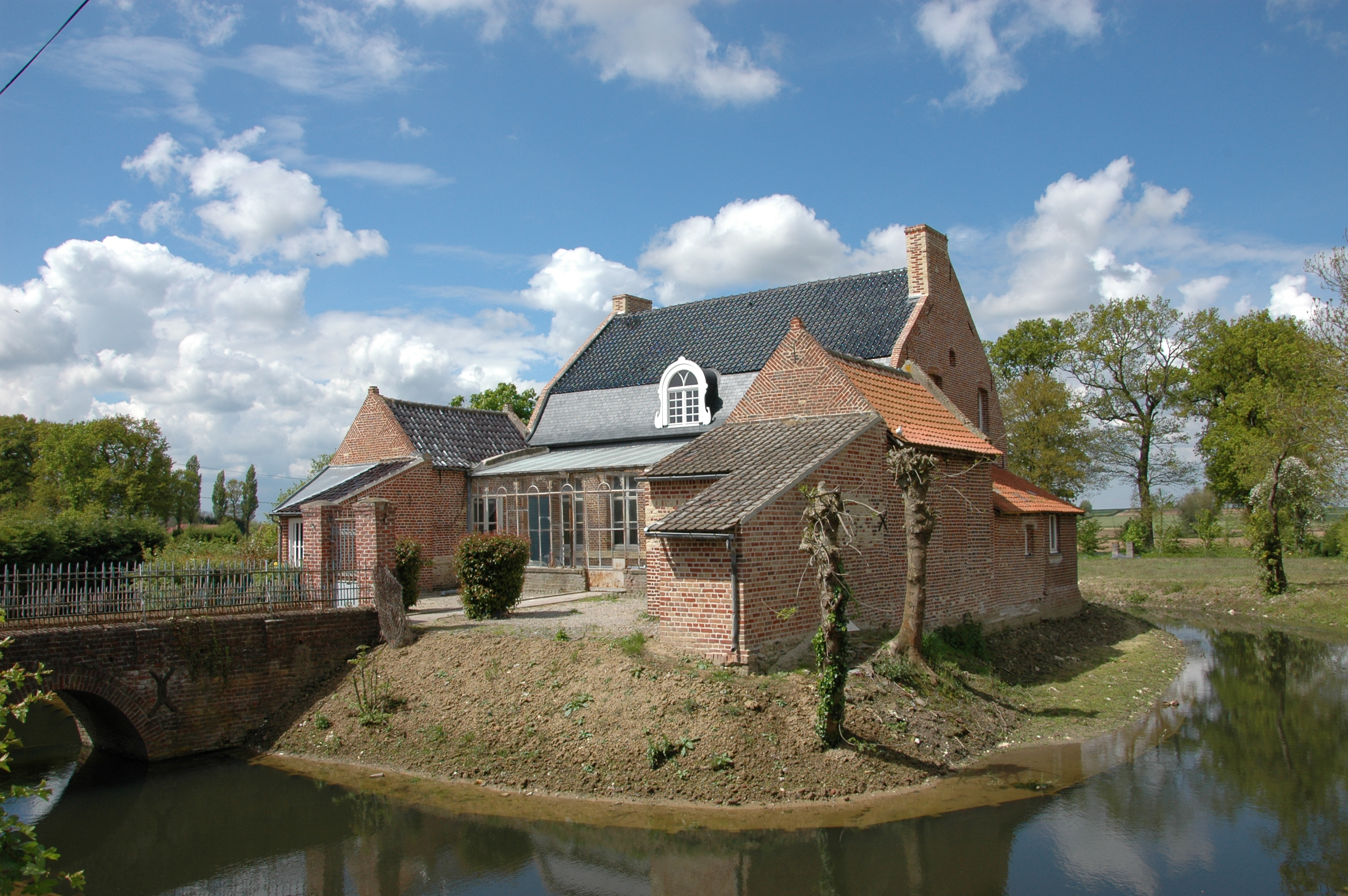 Presbytère de Rubrouck